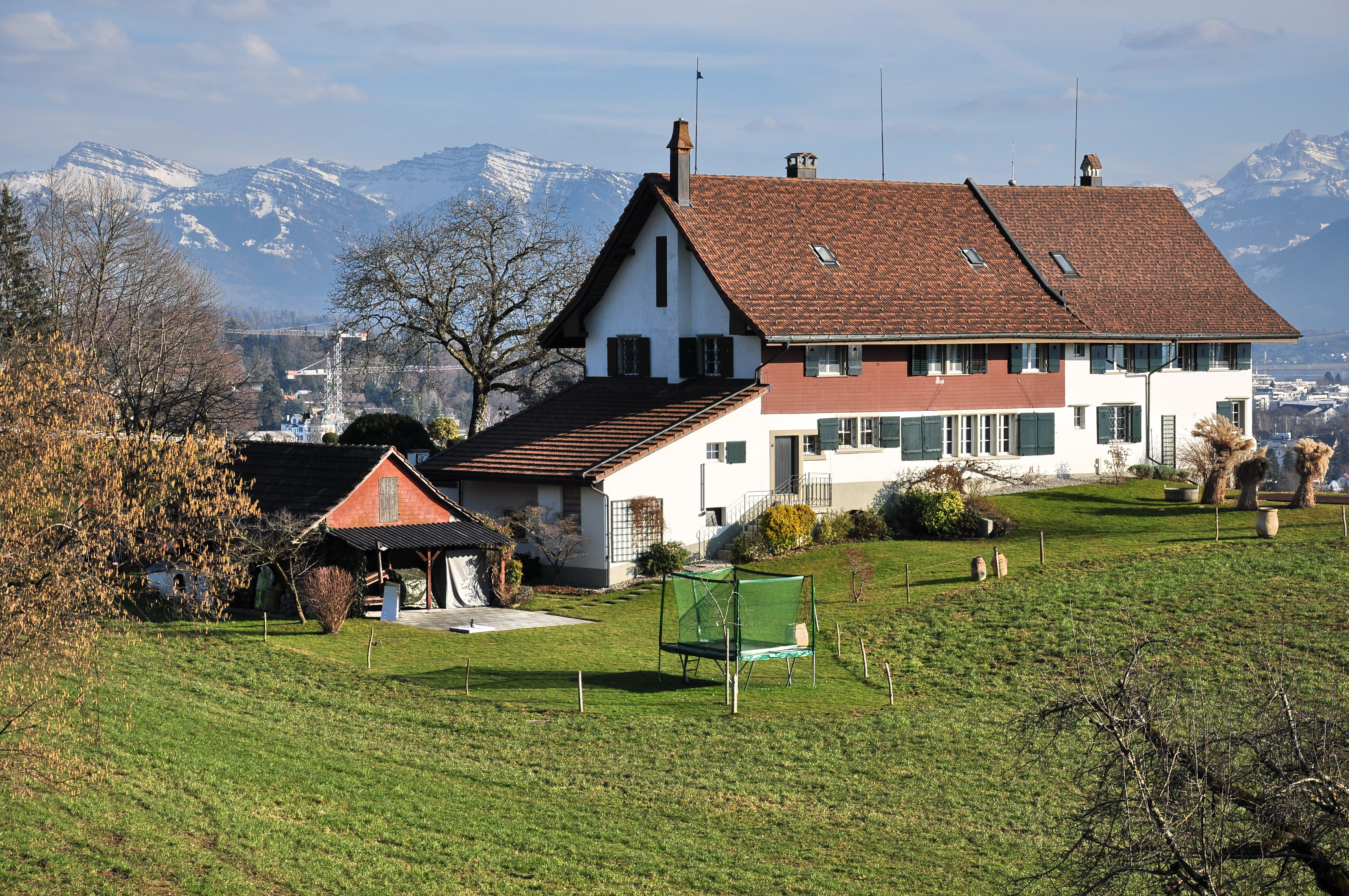 Höcklistein in Kempraten (Switzerland), Speer (to the left), Chüemettler and Federispitz in the background.